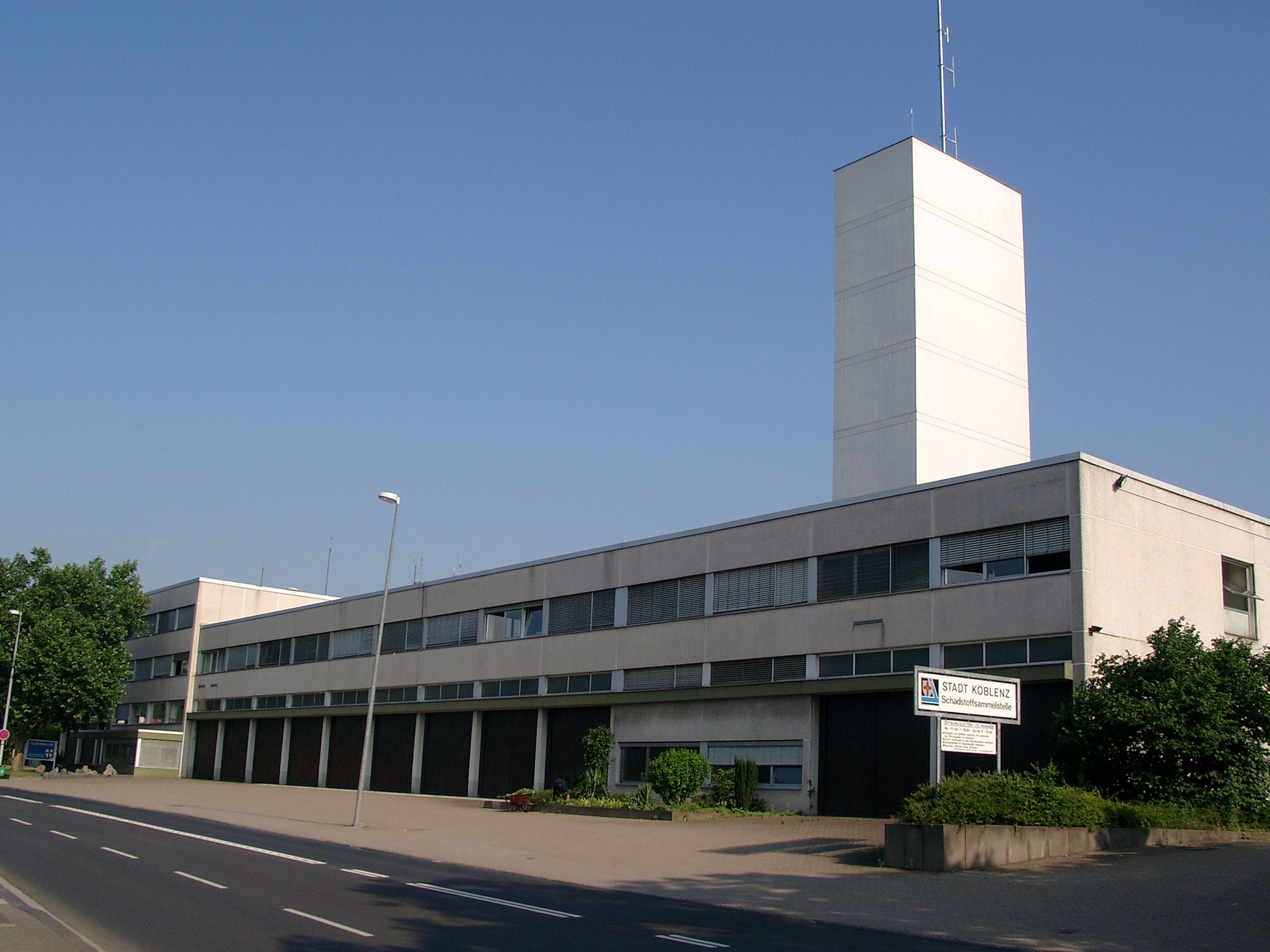 Hauptwache der Feuerwehr Koblenz